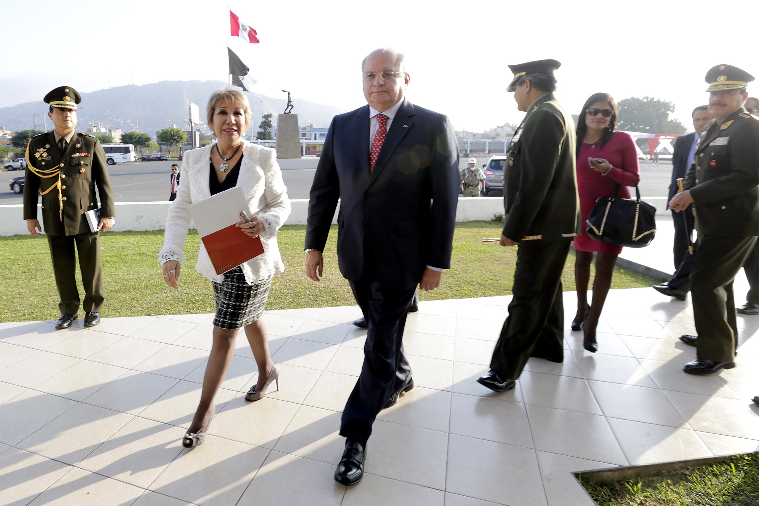 Los ministros de Defensa, Pedro Cateriano Bellido, y de Trabajo, Nancy Laos Cáceres, suscribieron el Convenio Marco de Cooperación interinstitucional entre ambos sectores que permitirá brindar capacitación y asesoría laboral a los jóvenes reclutas y licenciados del Servicio Militar.